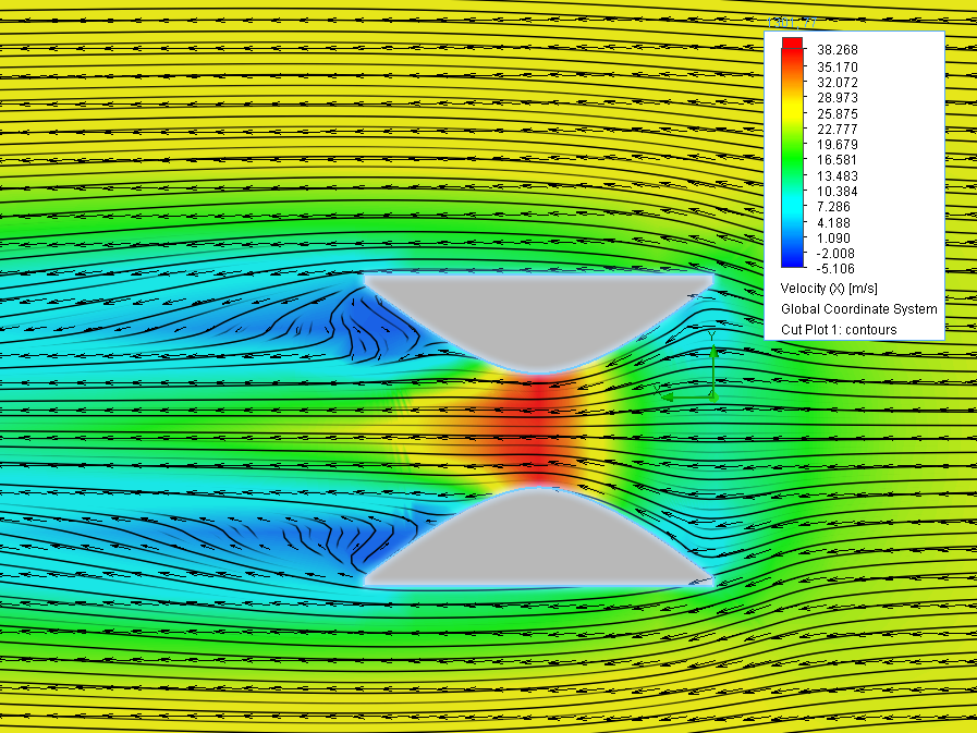 How the speed increase